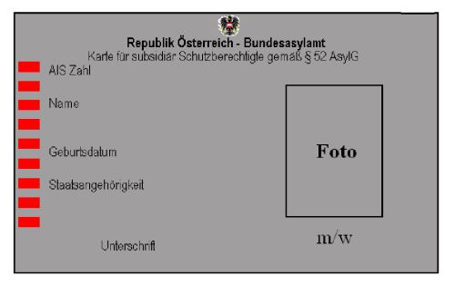 Karte für subsidiär Schutzberechtigte (specimen)